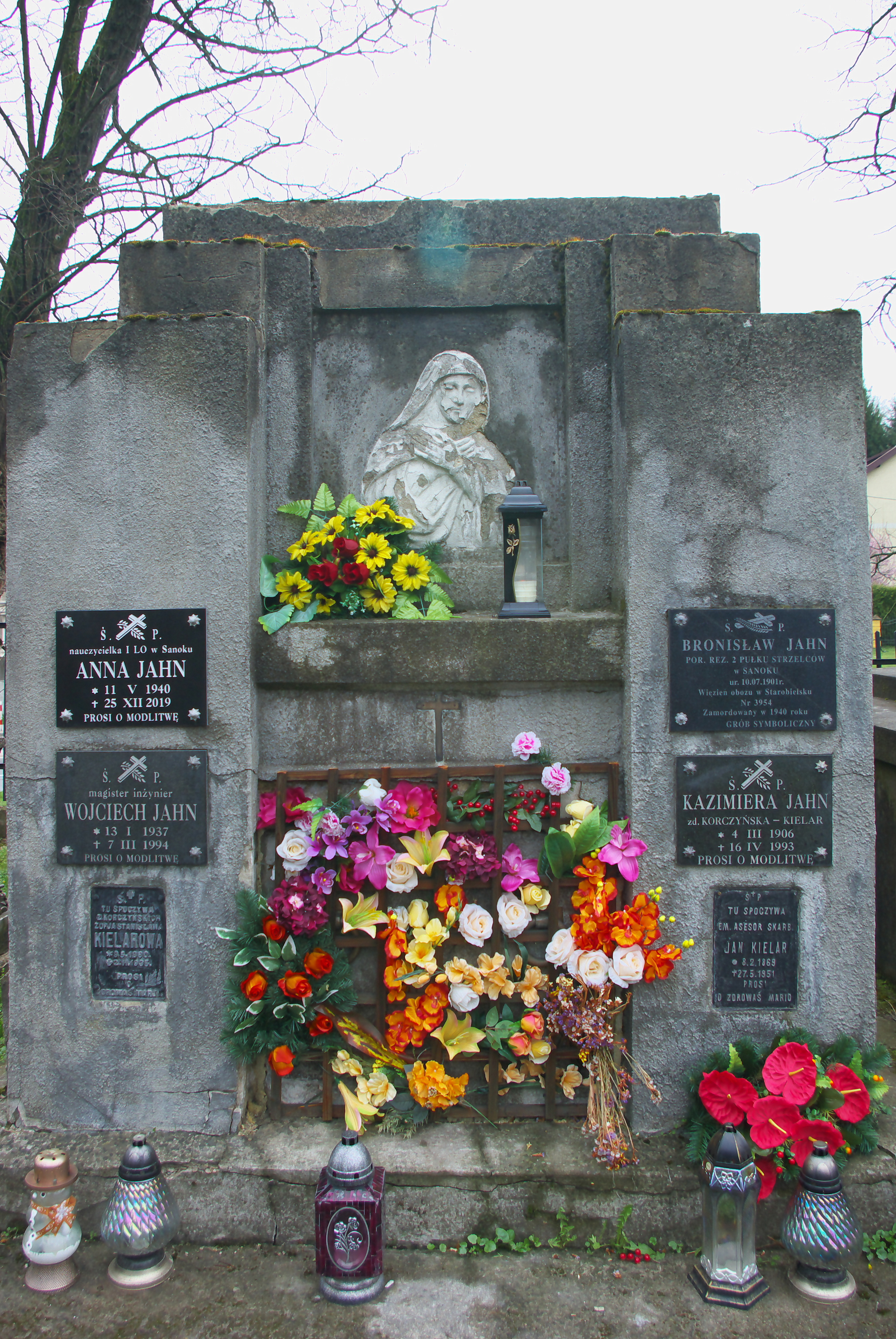 Grobowiec rodziny Jahn na Cmentarzu Centralnym w Sanoku.